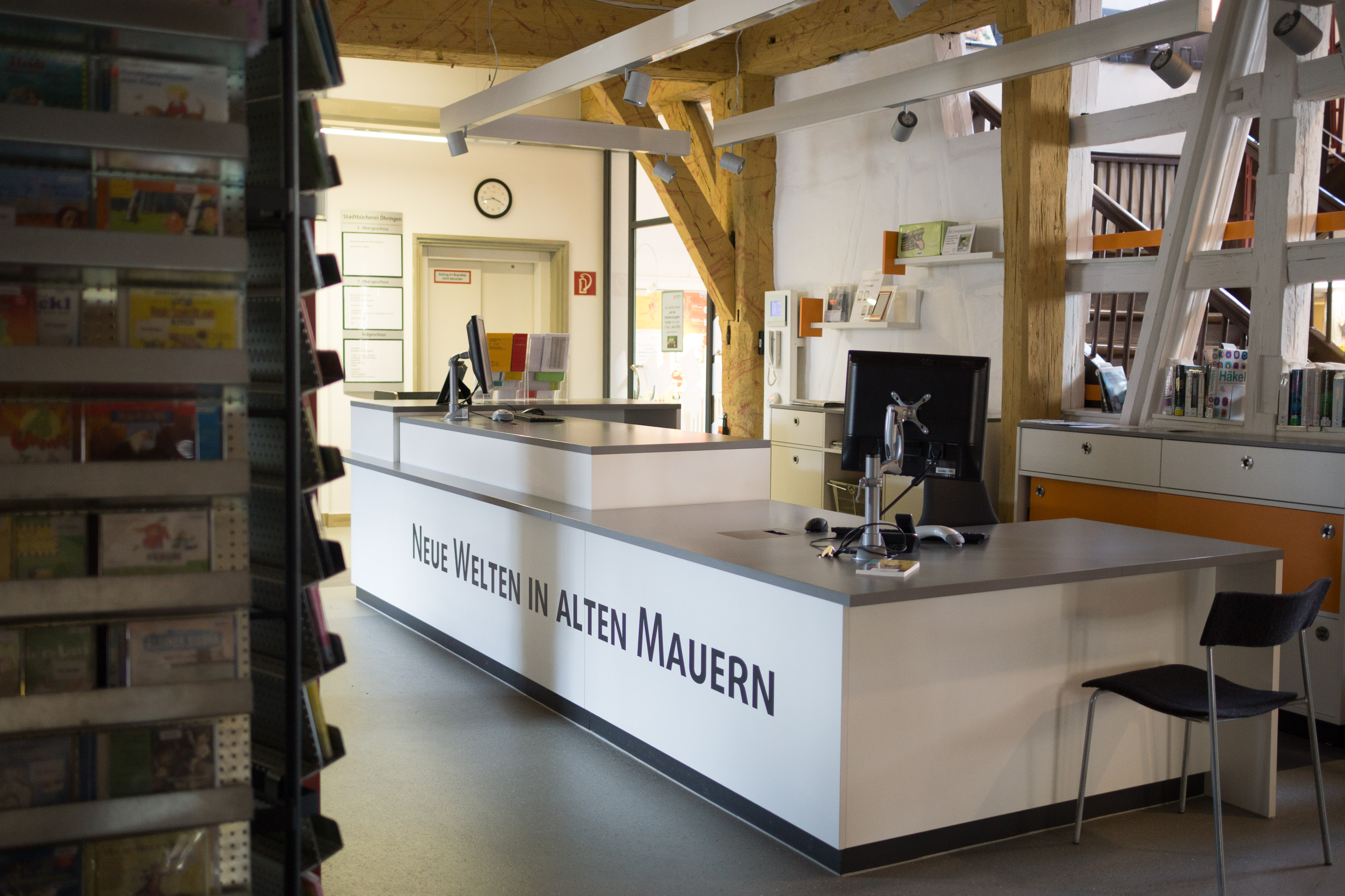 Innenansicht: Service-Theke mit Motto